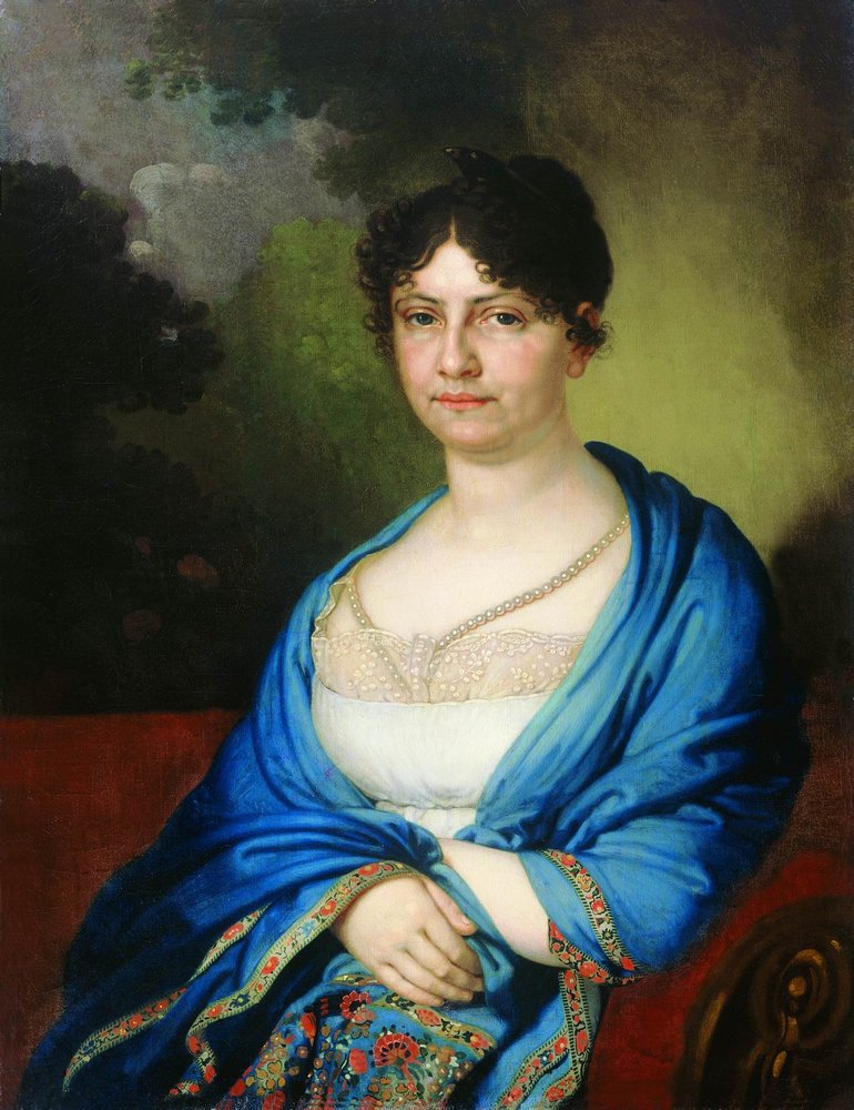 Голубцова М.И. // Рязанский художественный музей Мелания Ивановна Голубцова, урожденная фон Галлер (25.12.1777 – 03.11.1827) – жена министра финансов Ф.А. Голубцова. Погребена в церкви Св. Духа в Александро-Невской лавре в СПб. Встречается написание "Рагубцева"